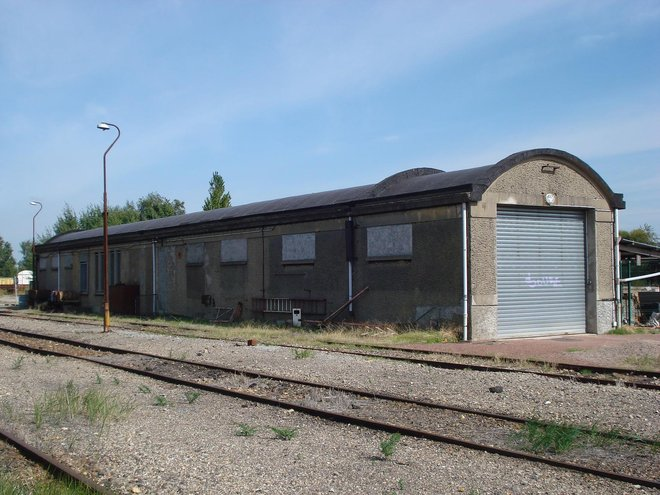 Le bureau mouvement (feuille, lampisterie, huilerie) de l'ancien dépôt vapeur de Trappes.